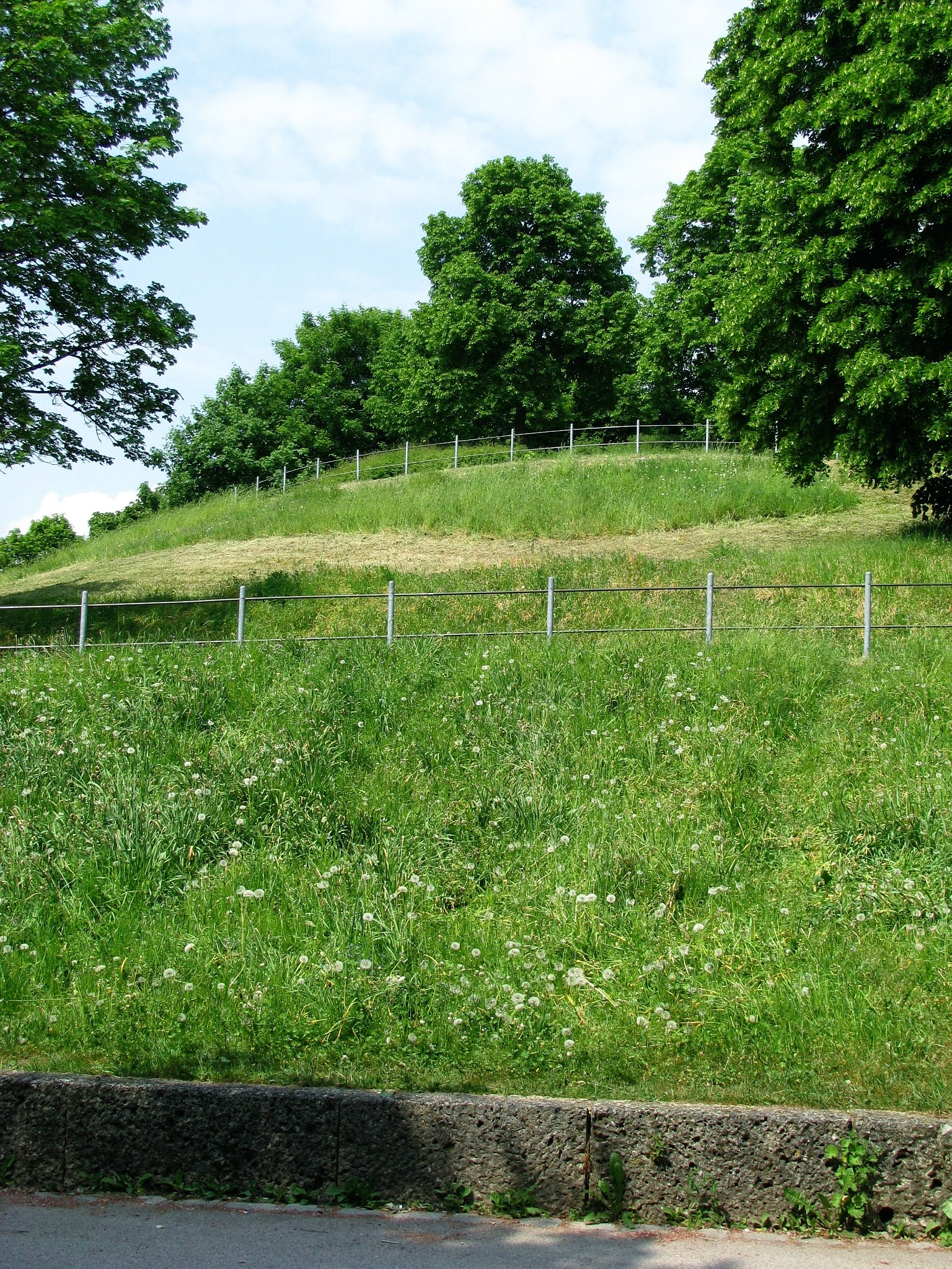 Westpark München, Hügel neben dem Biergarten im Westen des westlichen Teils